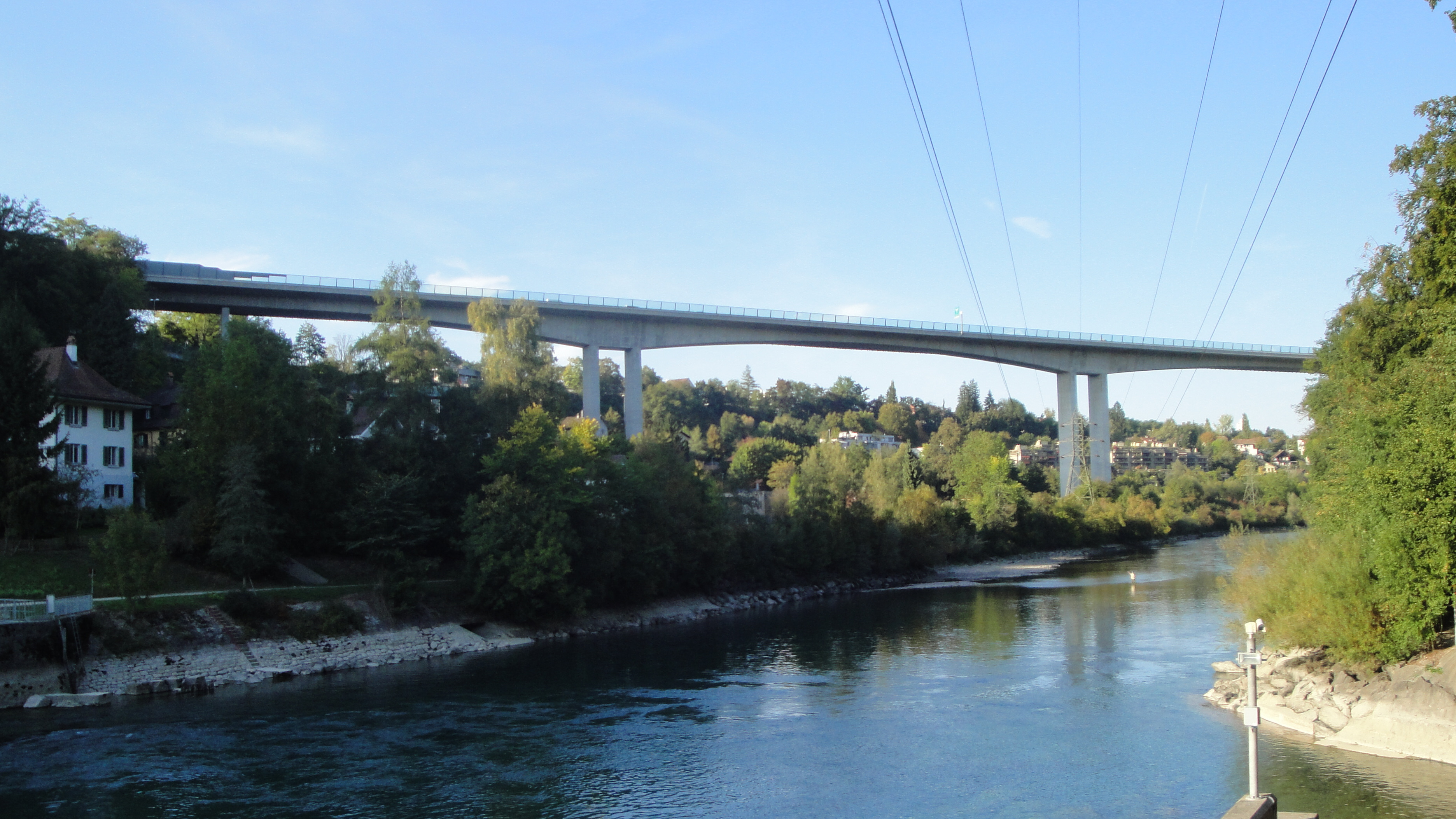 Bern, Felsenauviadukt